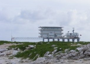 Isla de Aves - Venezuela Base Científico-Militar Simón Bolívar.